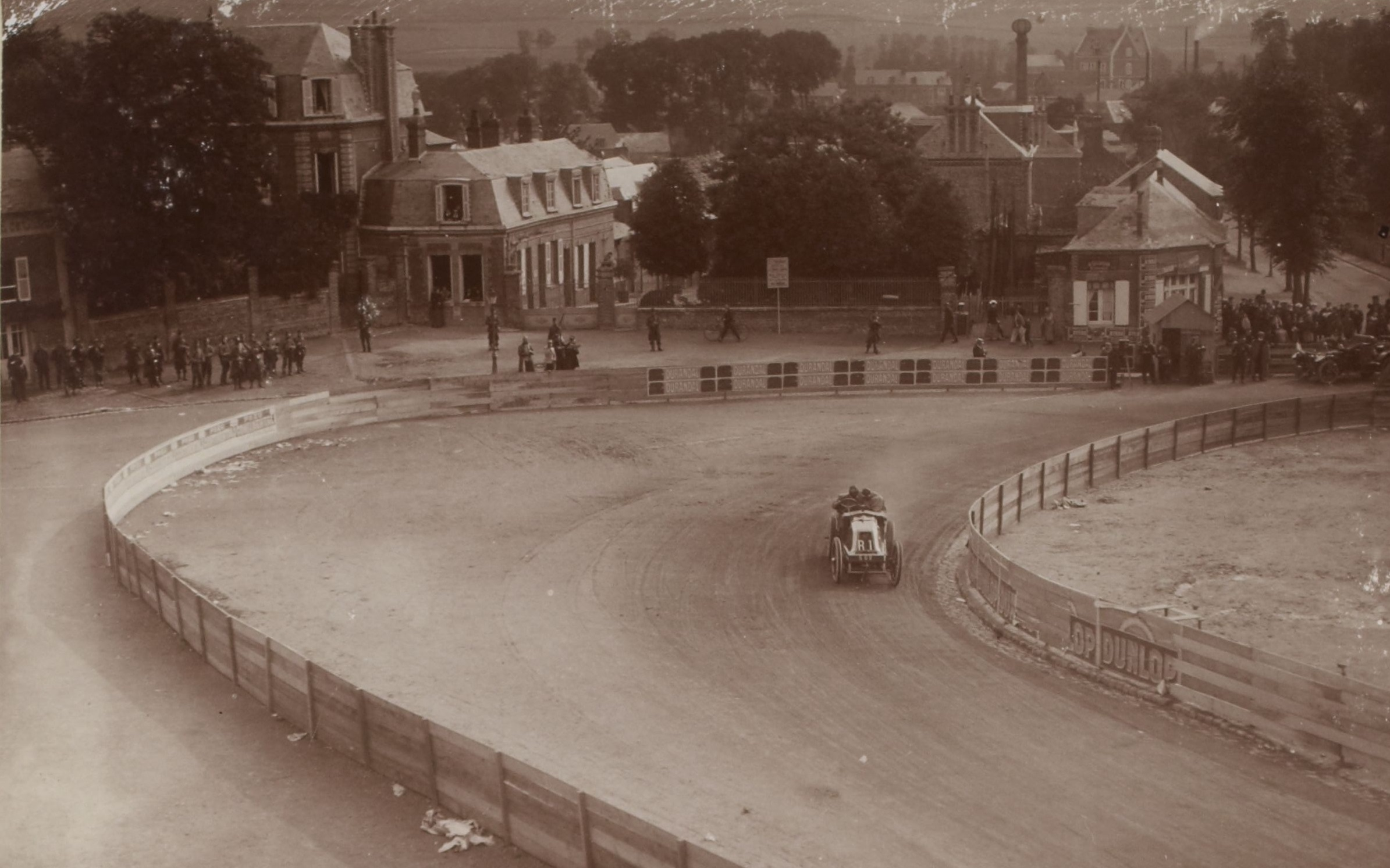 [Collection Jules Beau. Photographie sportive] : T. 34. Années 1907 et 1908 / Jules Beau : F. 7v. [Grand Prix de l\' A. C. F. [Automobile Club de France], Coupe de la Commission sportive, 2 juillet 1907]